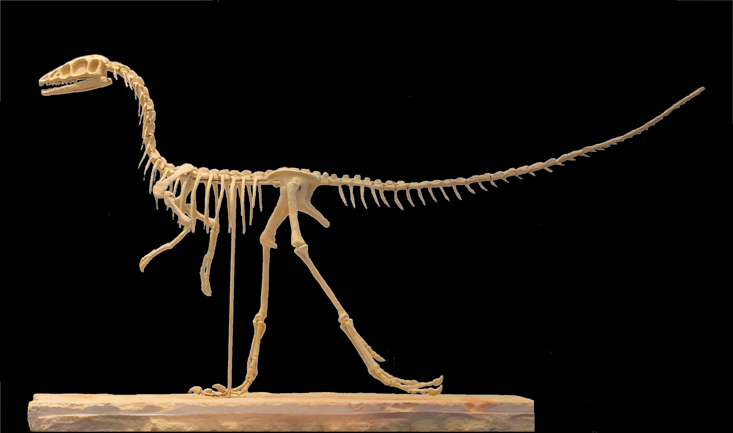 Bayerische Staatssammlung für Paläontologie und Geologie Reconstruction in Bayerische Staatssammlung für Paläontologie und Geologie in Munich